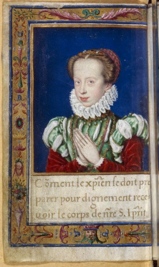 Christine de Lorraine (1565-1637)